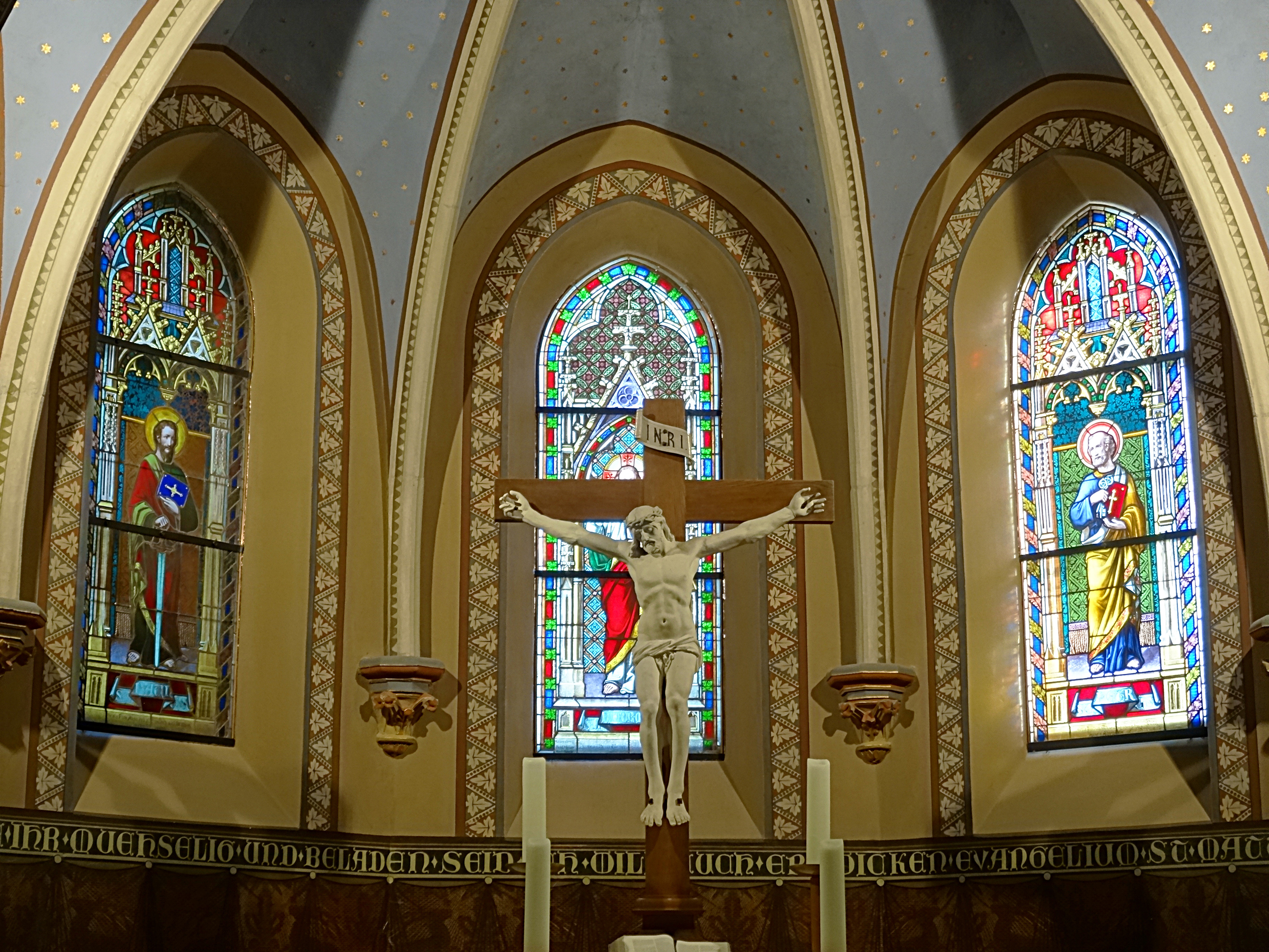 Chor mit Kruzifix und Buntglasfenstern aus der Quedlinburger Glasmalerwerkstatt Ferdinand Müller in St. Gertrud (Neugattersleben)